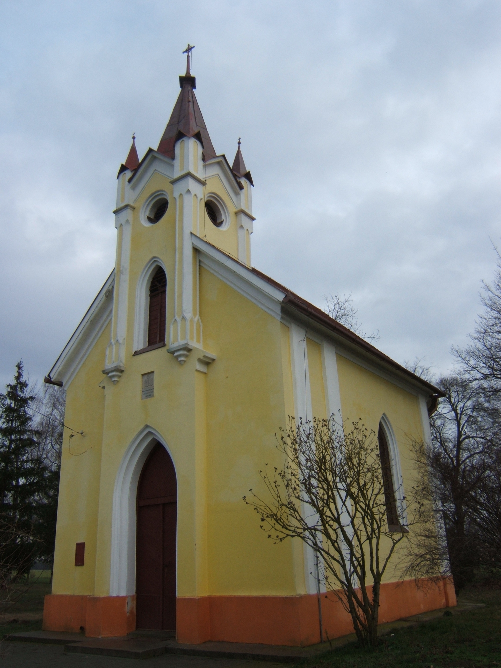 Bolhás, kápolna